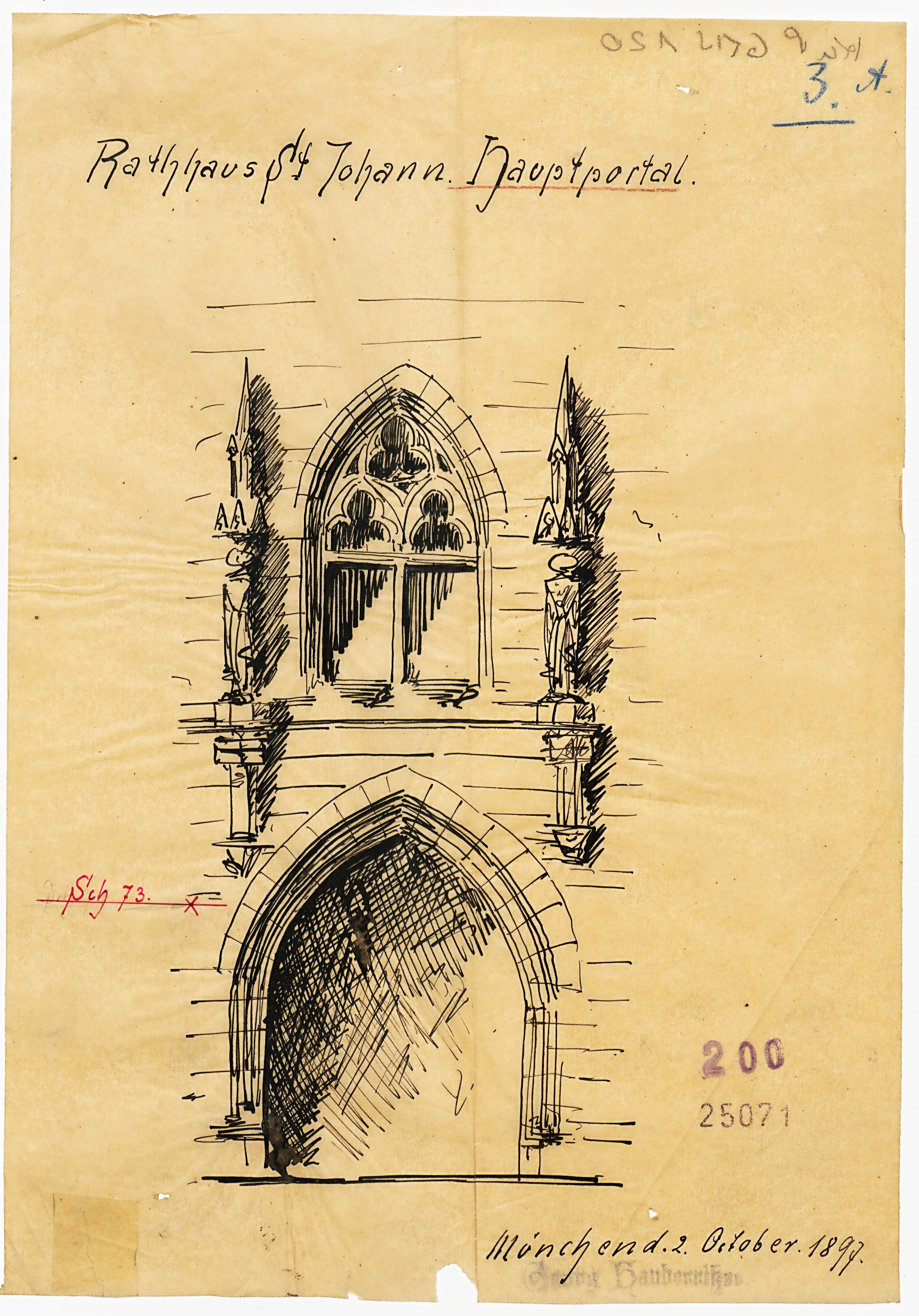 Rathaus St. Johann, Georg von Hauberrissers Entwurf zum Turmportal (1897)